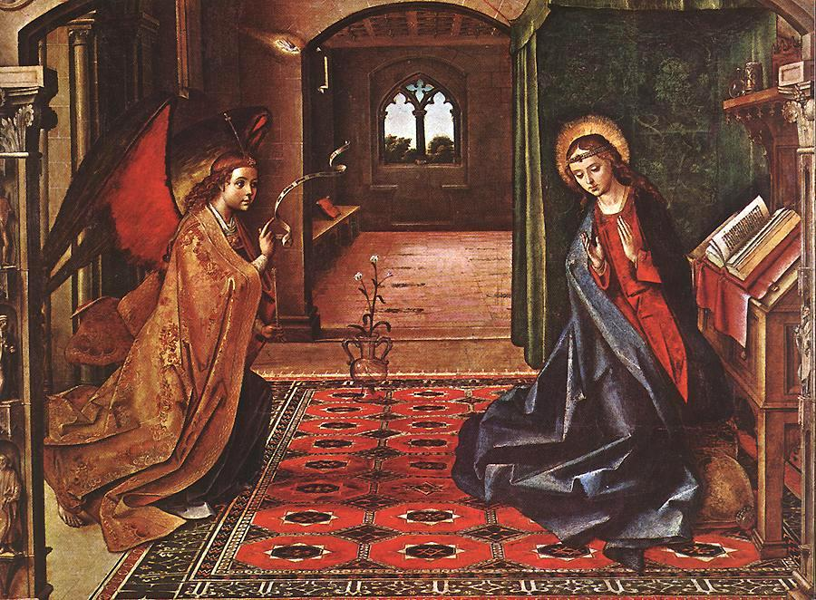 La obra representa el momento en que el arcángel San Gabriel anunció a la Virgen María que sería la madre del Mesías prometido por Dios al pueblo judío, Jesucristo.